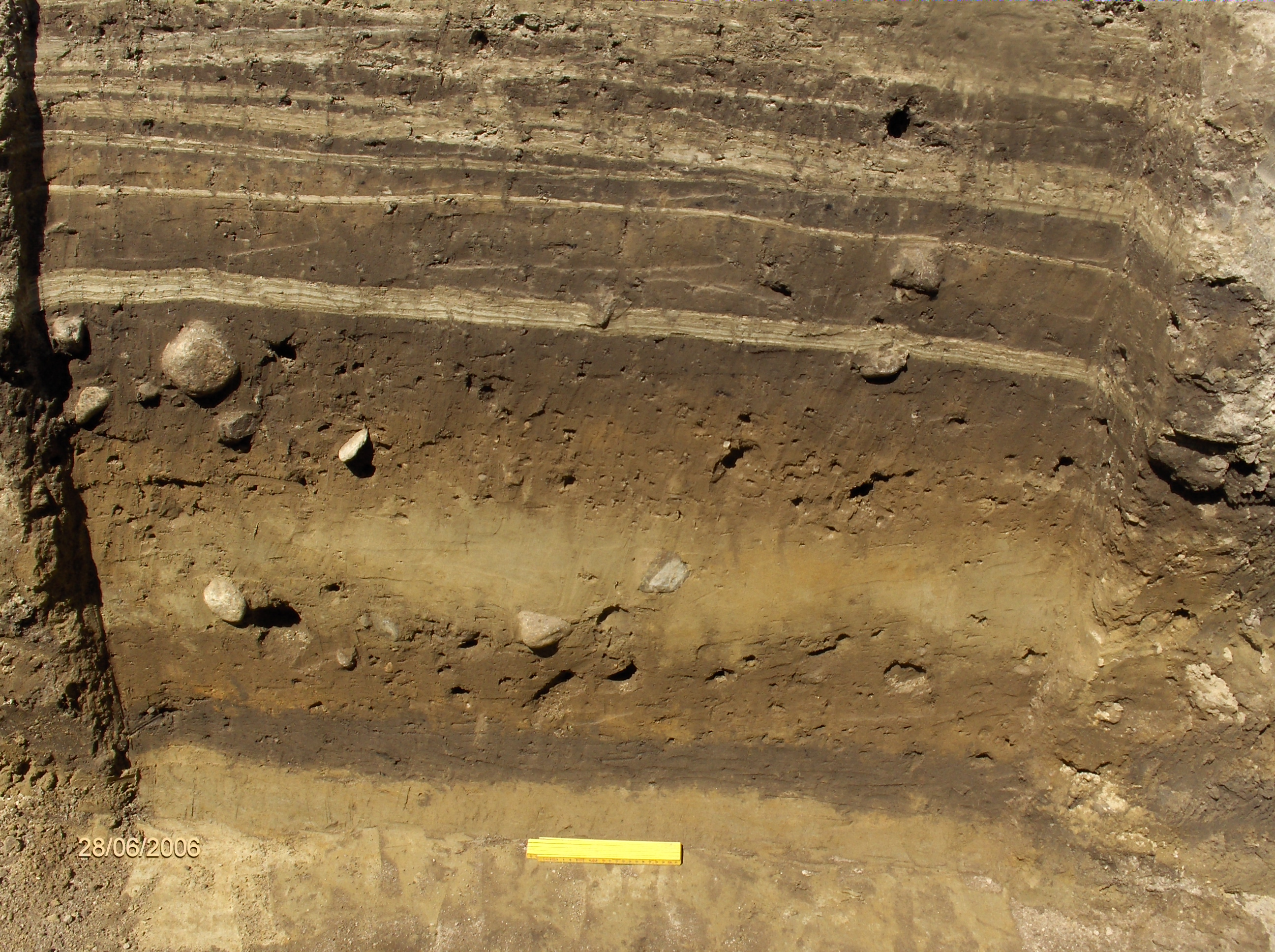 Dyrkingsprofil frå Kvåle, Sogndal